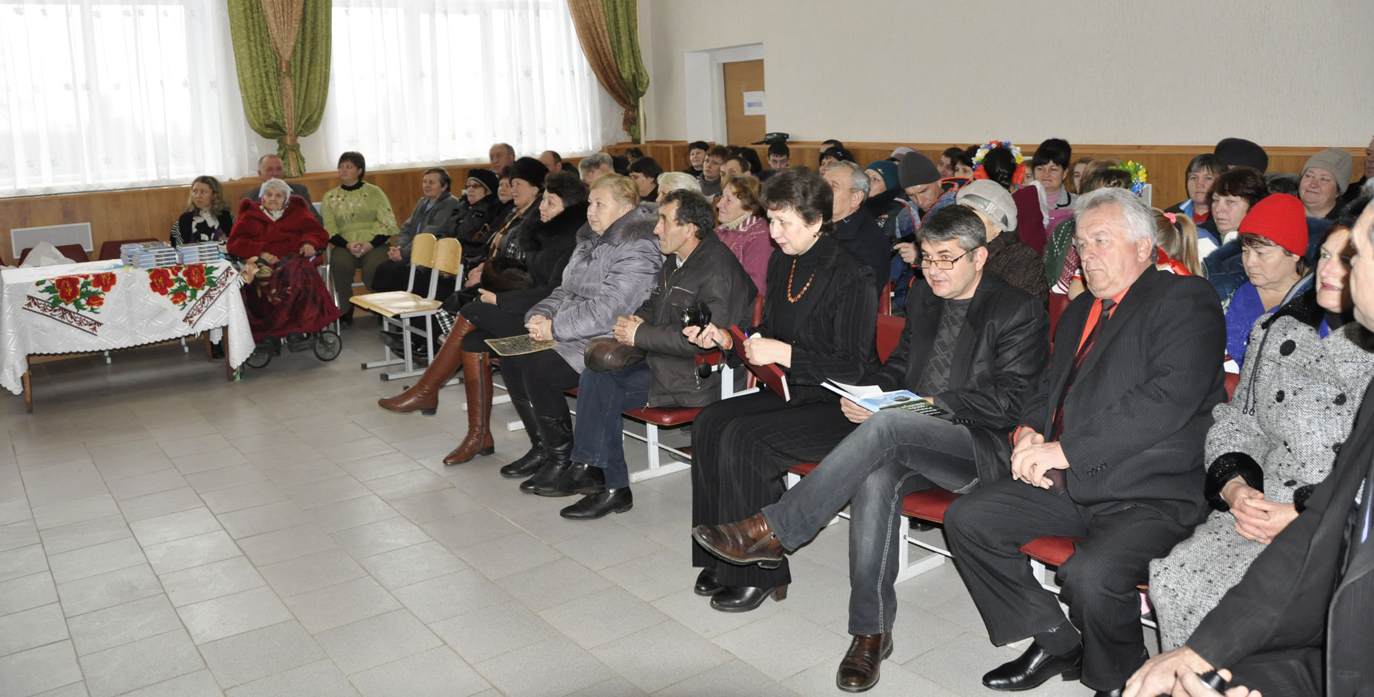 Село Марьевка. Презентация книги о Марьевке